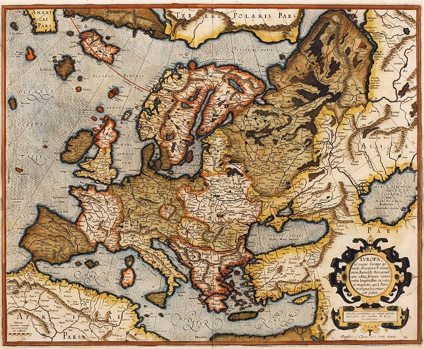 Europe map; title: Europa, ad magnae Europae; size 38 x 46 cm